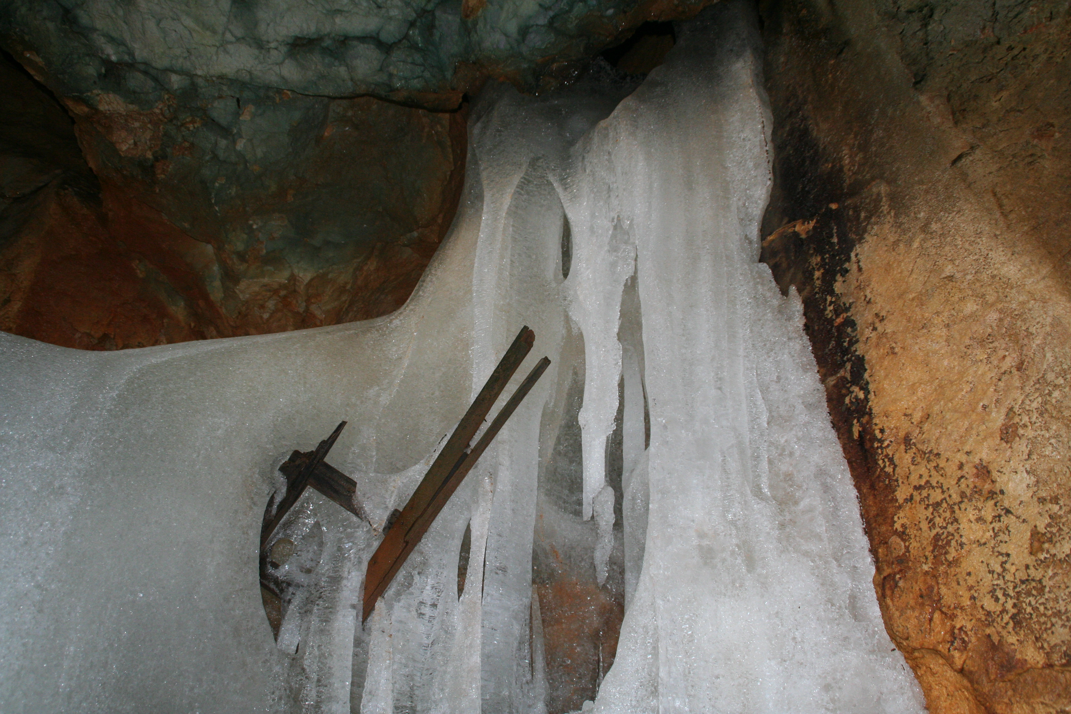 Schellenberger Eishöhle